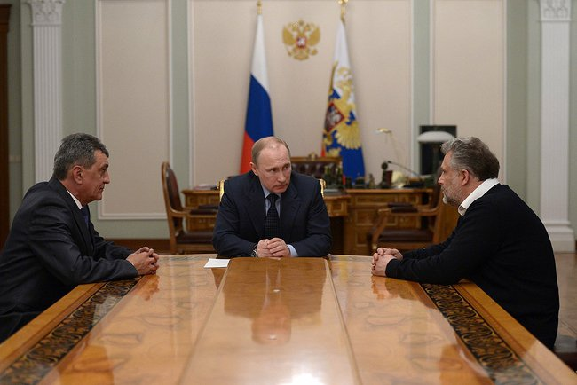 Владимир Путин на встречается с Сергеем Меняйло и Алексеем Чалым